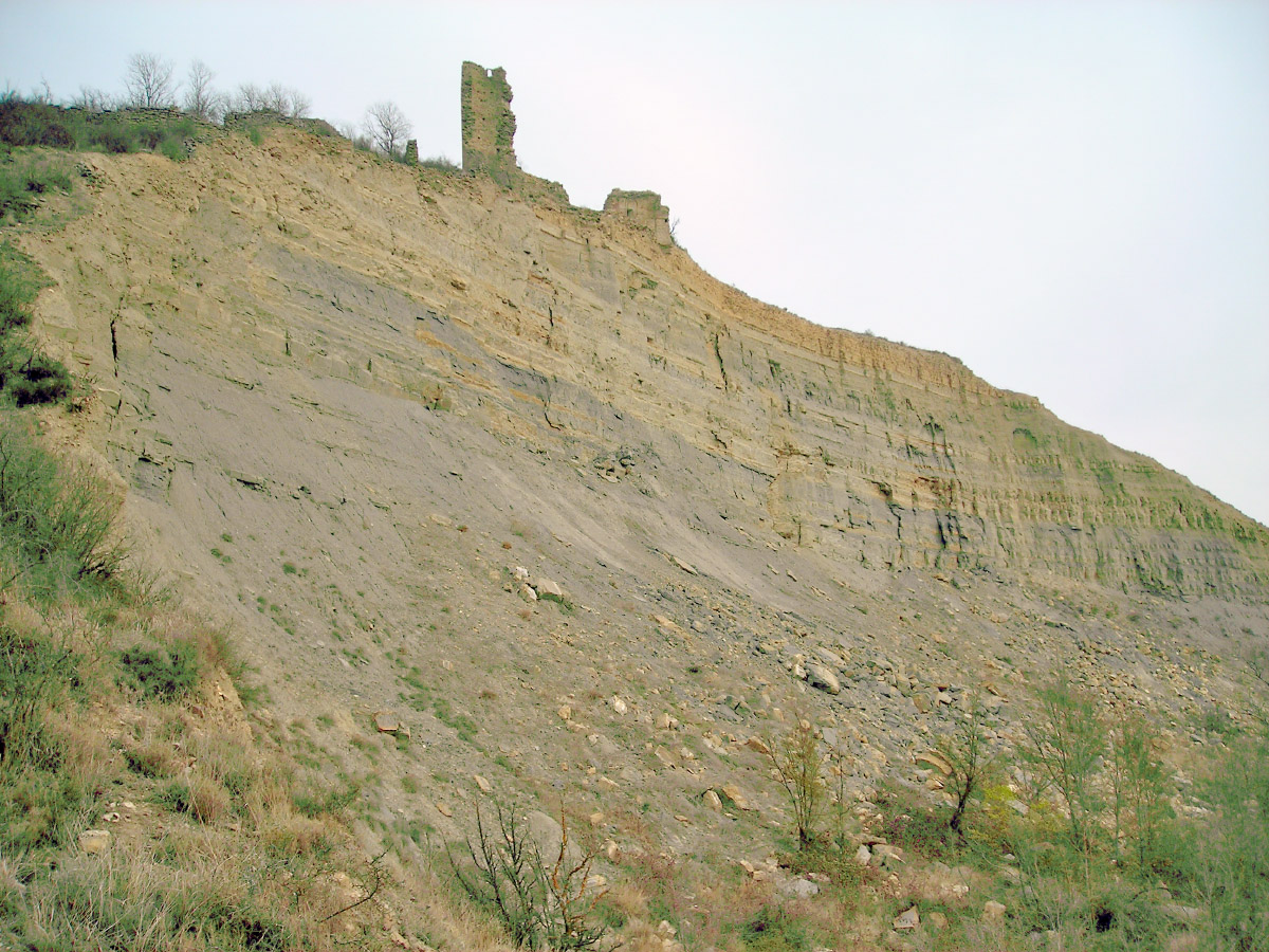 Restes de l'antic poble de Puigcercós, menjat per l'esllavissada